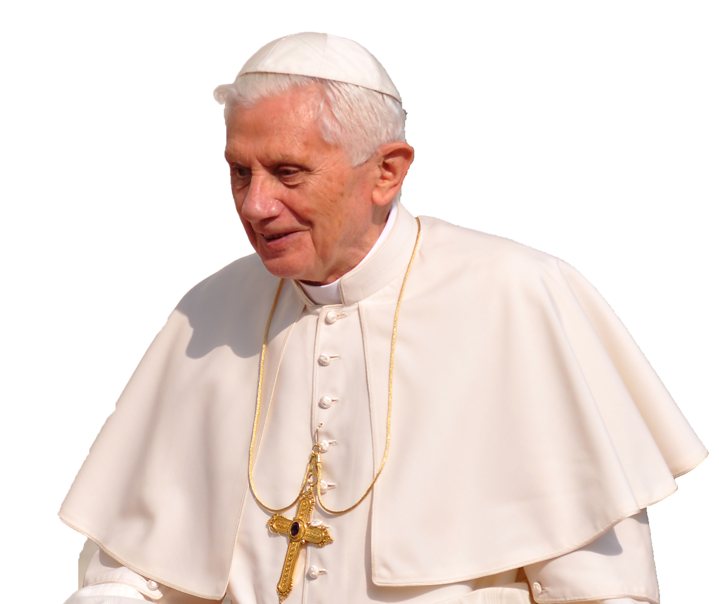 Foto del Papa, ritaglio.